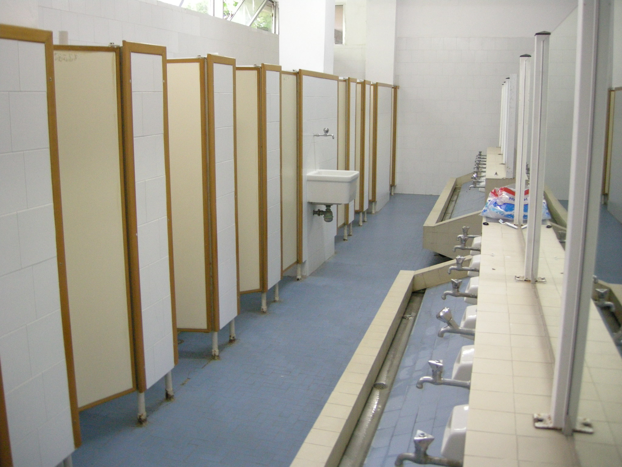 Colonia olivetti, bagni dei bambini